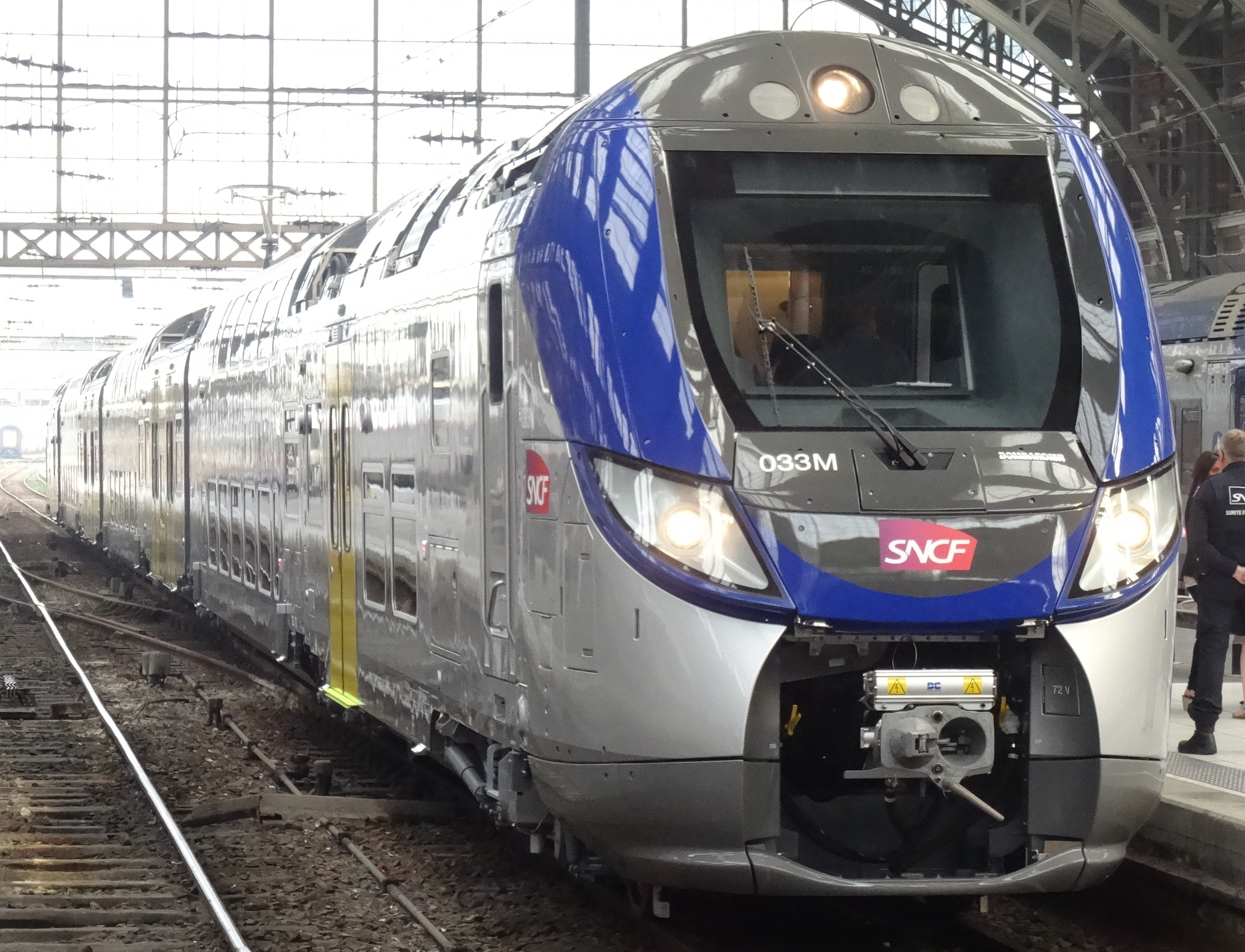 Présentation du Regio 2N de Bombardier Transport le 22 septembre 2014 en gare de Lille-Flandres, Lille, Nord, Nord-Pas-de-Calais, France.